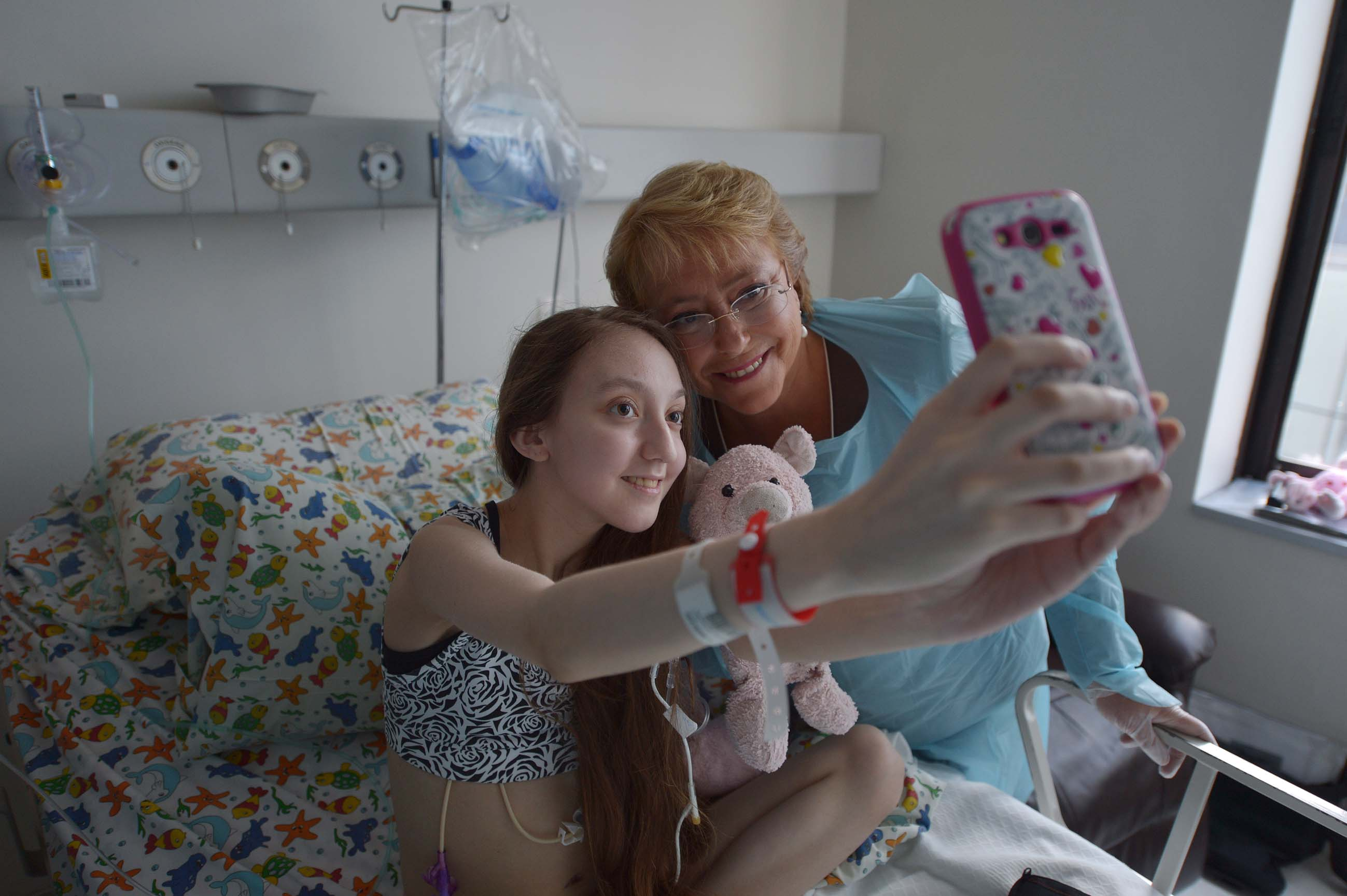 Presidenta Bachelet visita a Valentina Maureira. Hasta el Hospital Clínico de la Universidad Católica llegó la Jefa de Estado, Michelle Bachelet, acompañada por la ministra de Salud, Carmen Castillo, para reunirse con la menor que padece fibrosis quística, Valentina Maureira, y su padre, quienes conversaron con la Mandataria durante más de una hora.